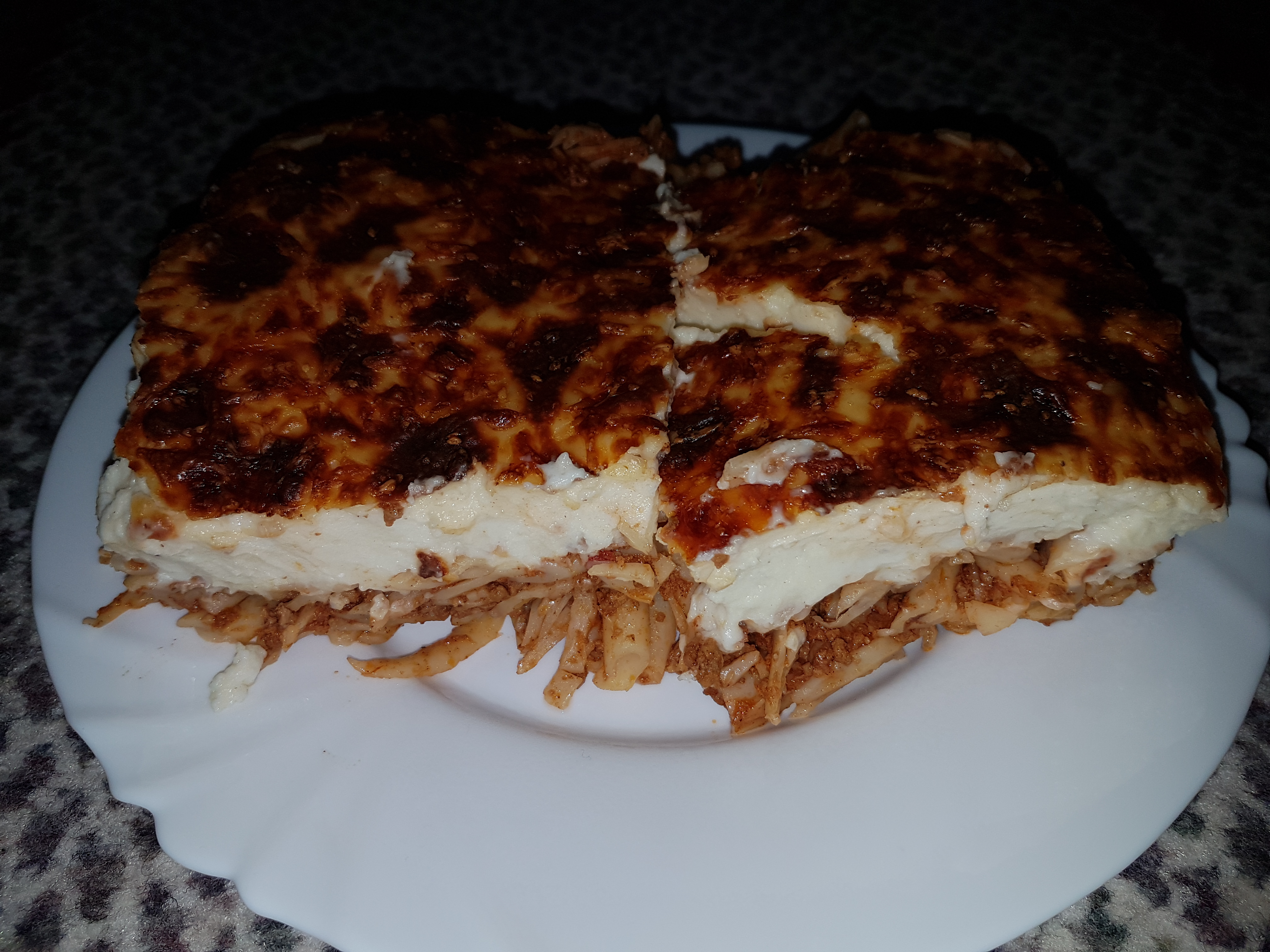 Δύο κομμάτια παστίτσιο